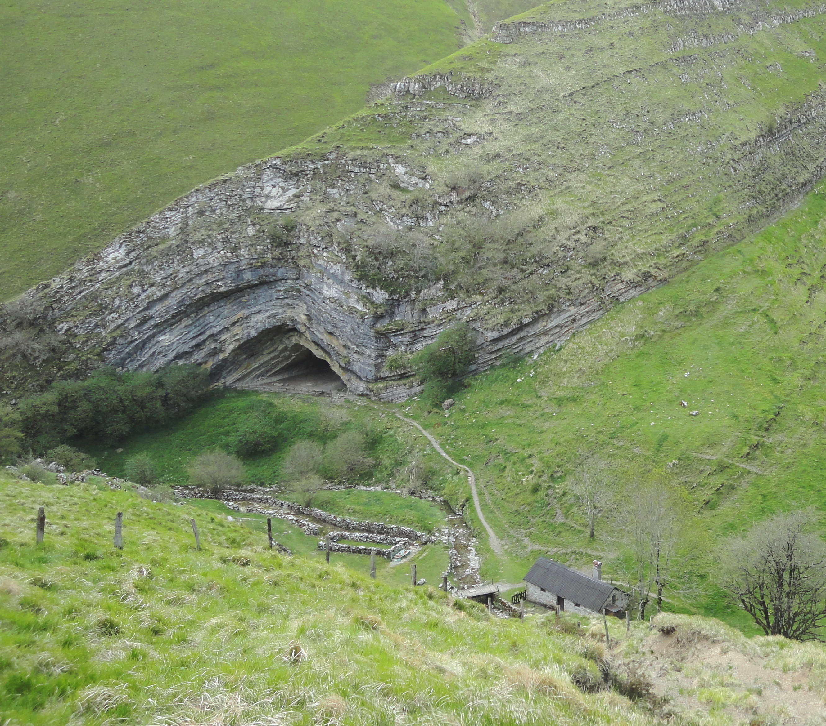 Harpea kobazuola, Mendizar eta Errozate inguruetan